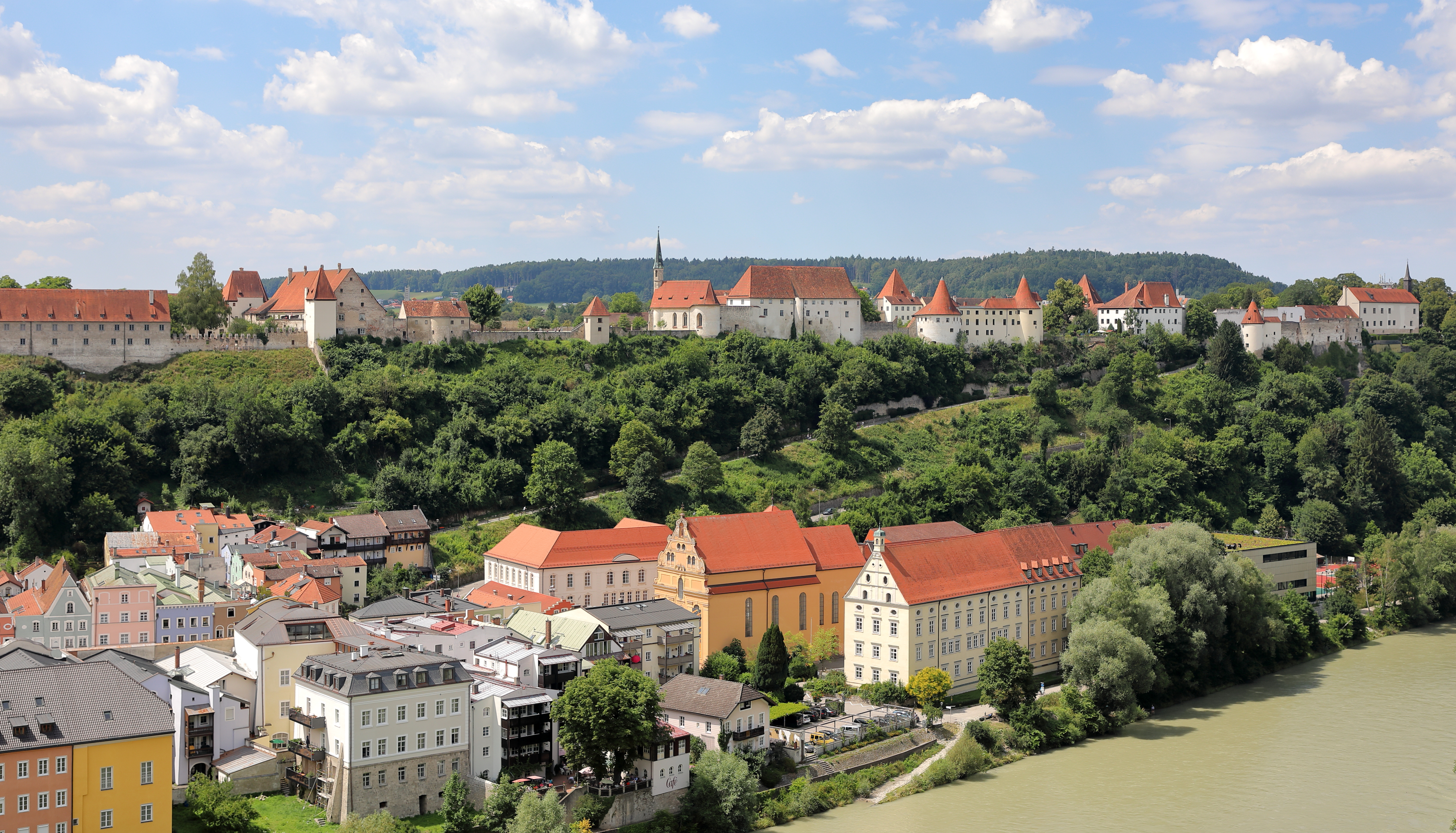 Südostansicht des dritten (tw.), vierten und fünften Vorhofes bzw. des nördlichen Bereichs der Burg zu Burghausen in der deutschen Herzogstadt Burghausen im oberbayerischen Landkreis Altötting.